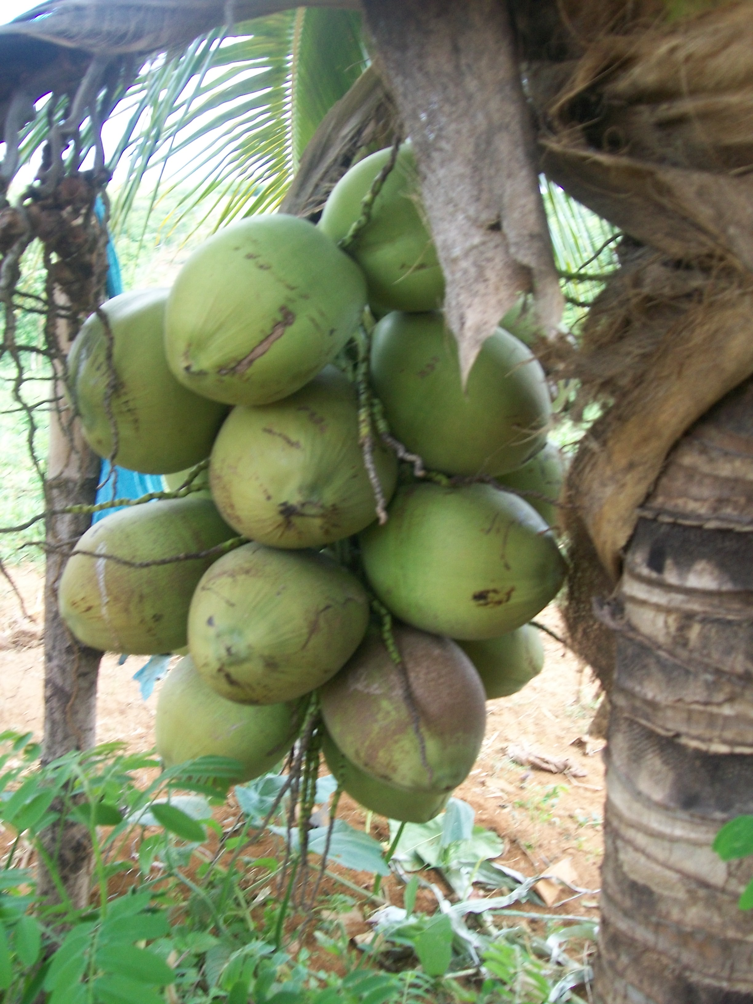 Caetité - BA - Fazenda Varginha - Côco da Bahia